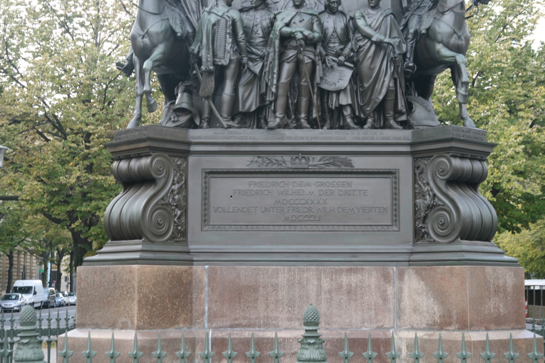 Reiterstandbild - Friedrich der Große - Ostansicht ( Details - unten ) Sockel - unten ( Namensfeld ) Berlin - Unter den Linden ( Mittelpromenade ) Baudenkmal ( LDA ) Landesdenkmalamt - Berlin Dok Nr. 09060118 LDA Info wiki Reiterstandbild Friedrichs des Großen